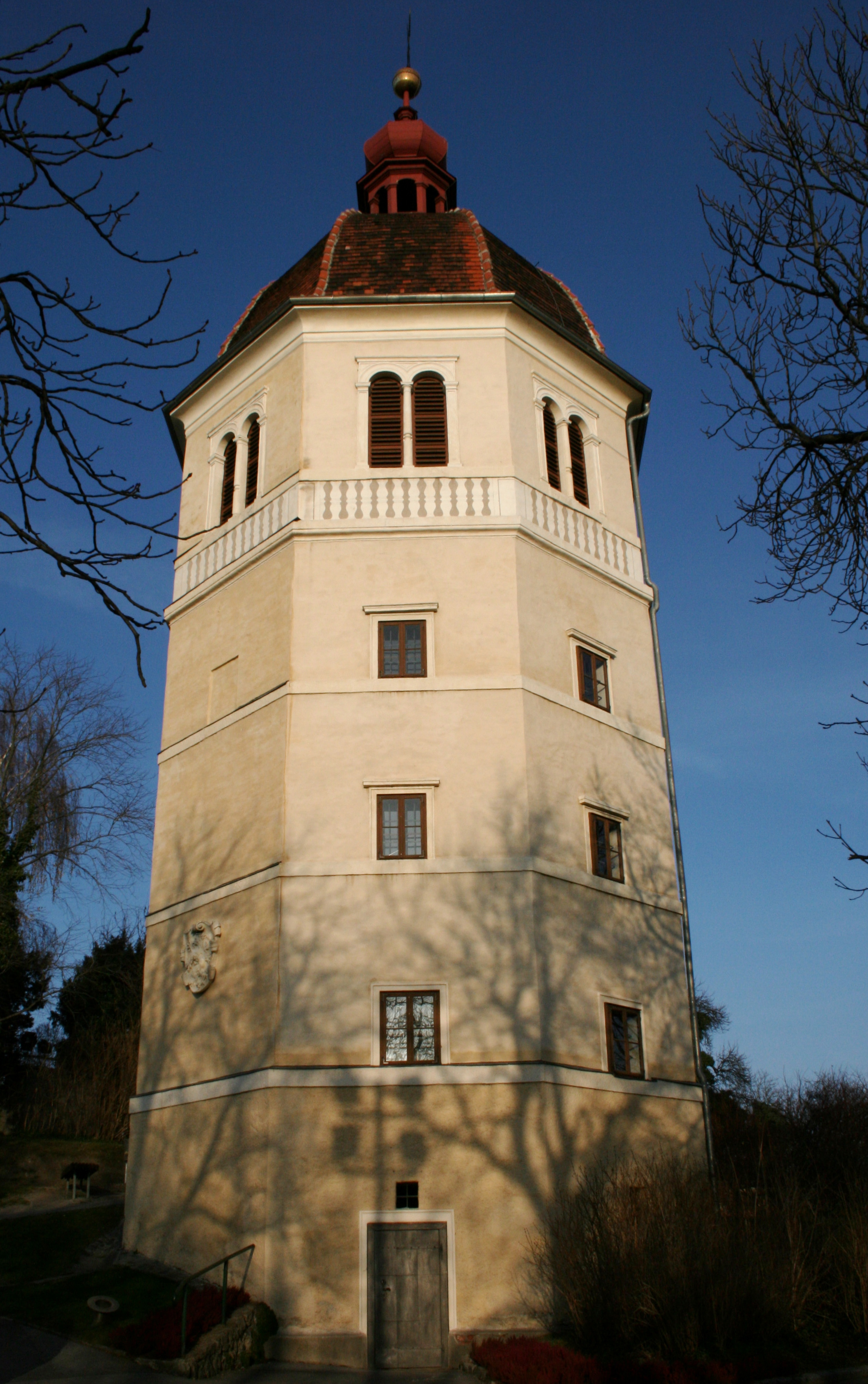 Graz, Austria: Glockenturm am Schlossberg